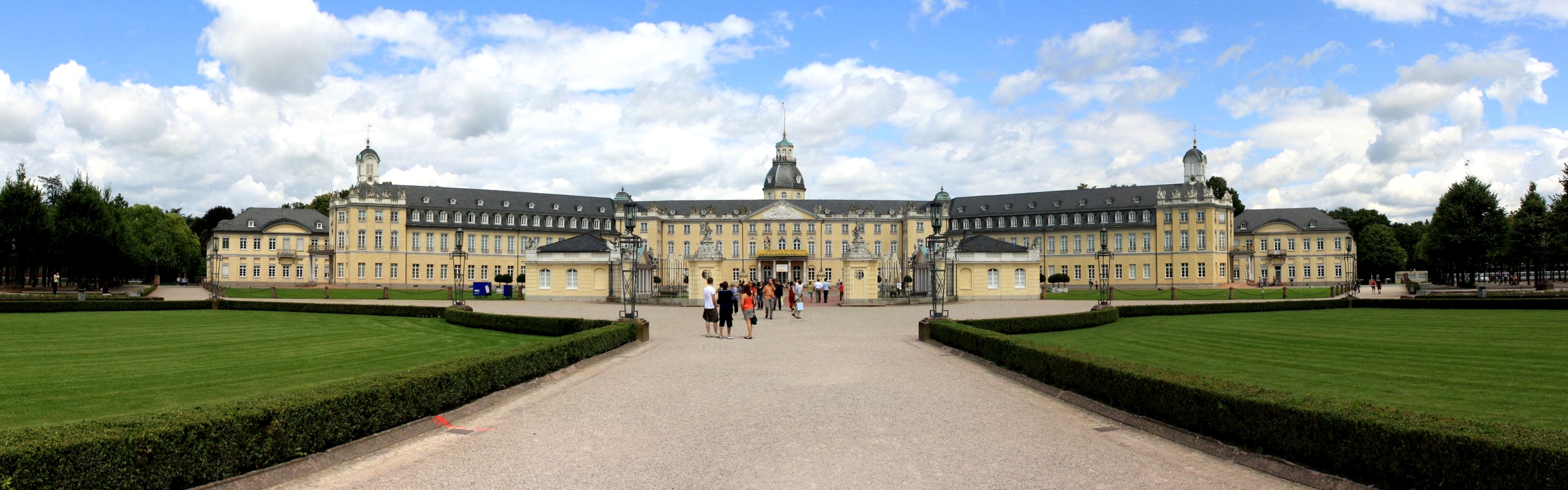 Panorama des Karlsruher Schlosses